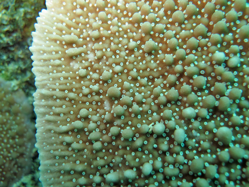 Montipora danae mostrando las bocas de los pólipos en la superficie de la colonia, en isla Lizard, Australia